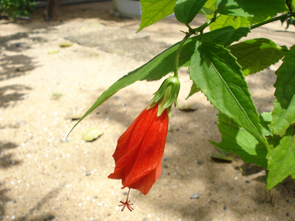 മുളക് ചെമ്പരത്തി എന്ന്‌ പറയാറുണ്ട്‌.